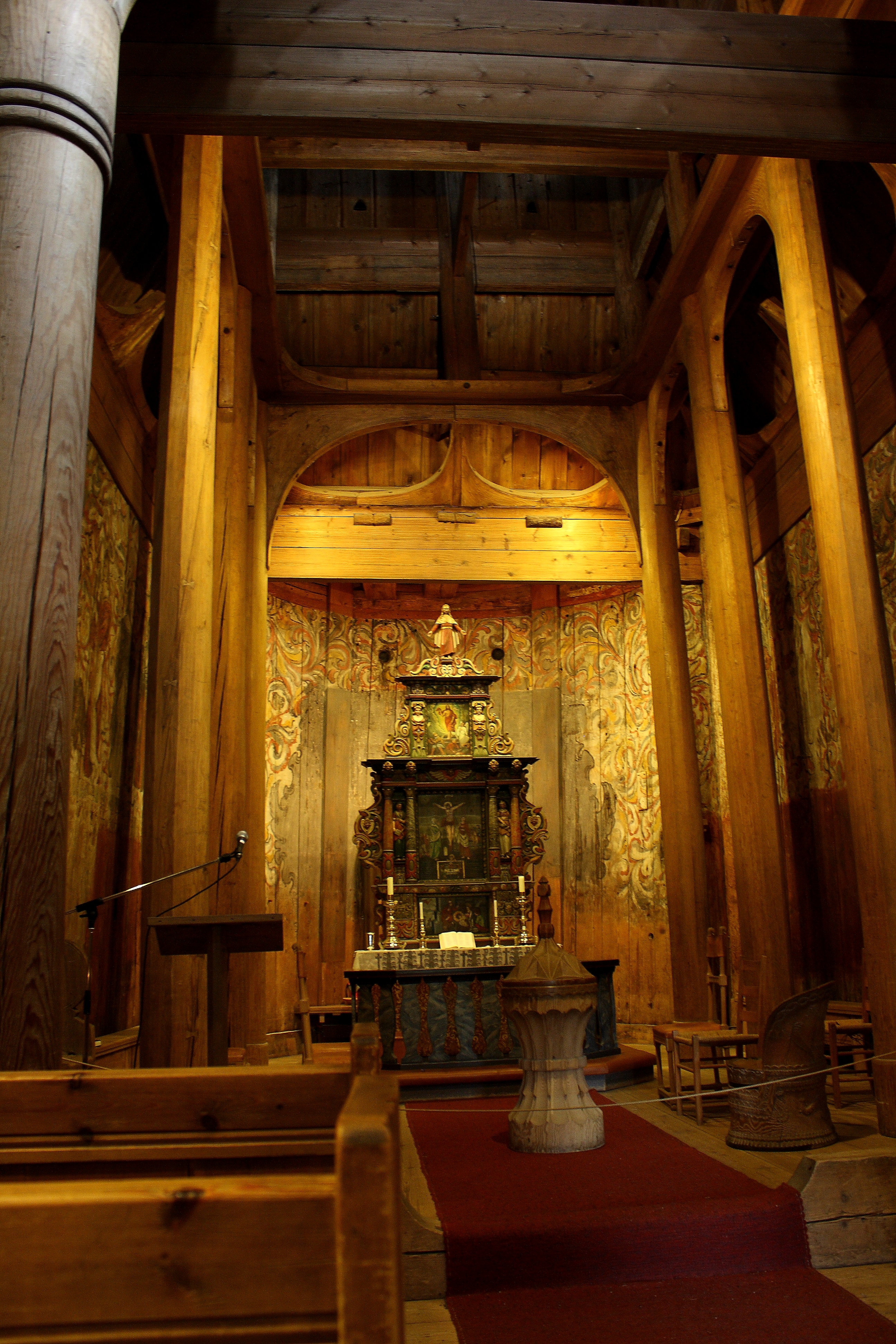 Mot koret i Heddal stavkyrkje